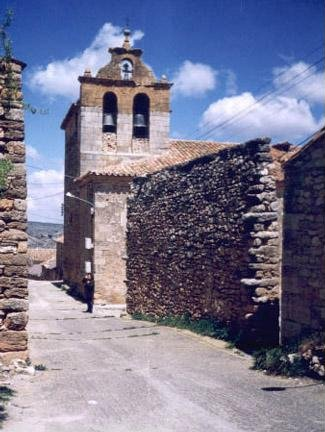 Iglesia de La Riba de Escalote (Soria). Tomada por Jaime Mas en 2001 y licenciada bajo los términos de Copyright de Wikipedia. Aparecida también en Category:Province of Soria